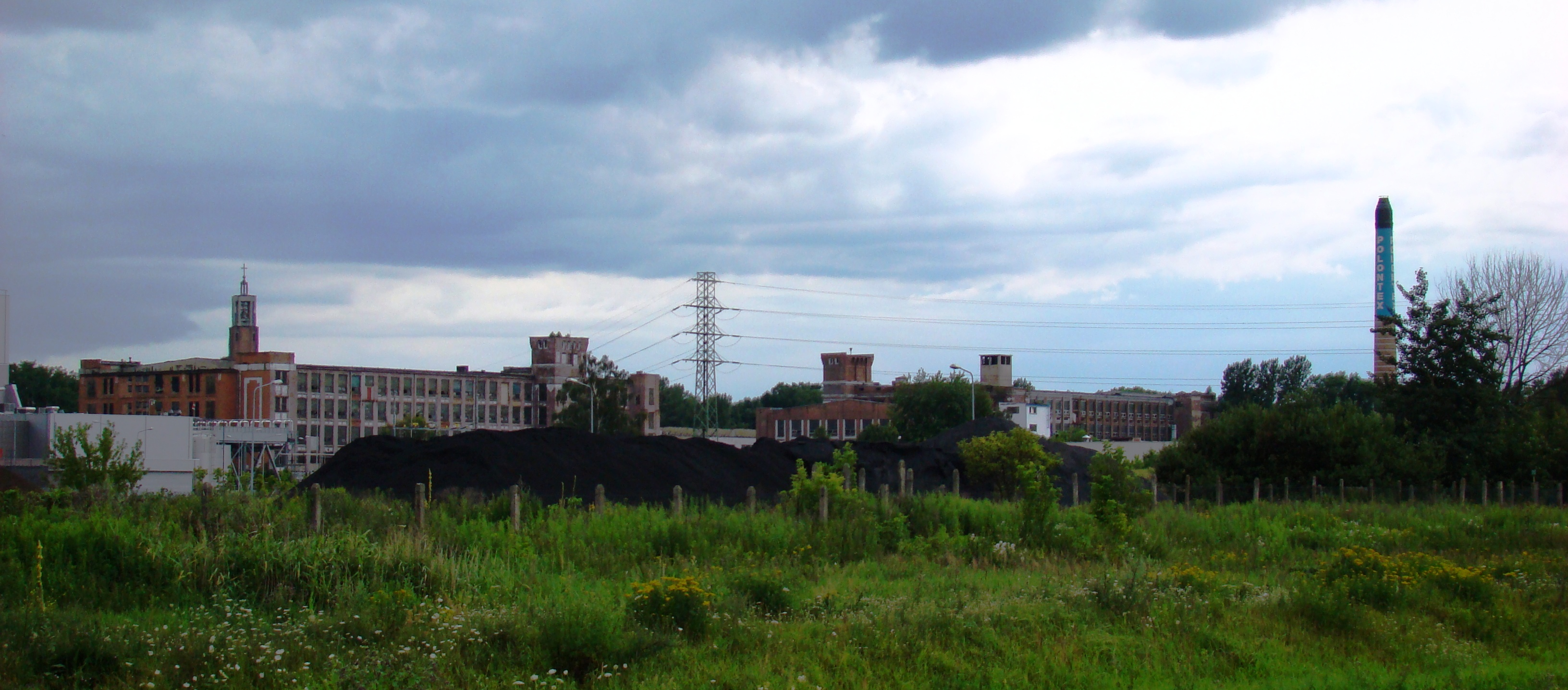 Budynki dawnych Zakładów Przemysłu Bawełnianego "Ceba" w Częstochowie, obecnie "Polontexu" w Częstochowie od strony rzeki Warty.